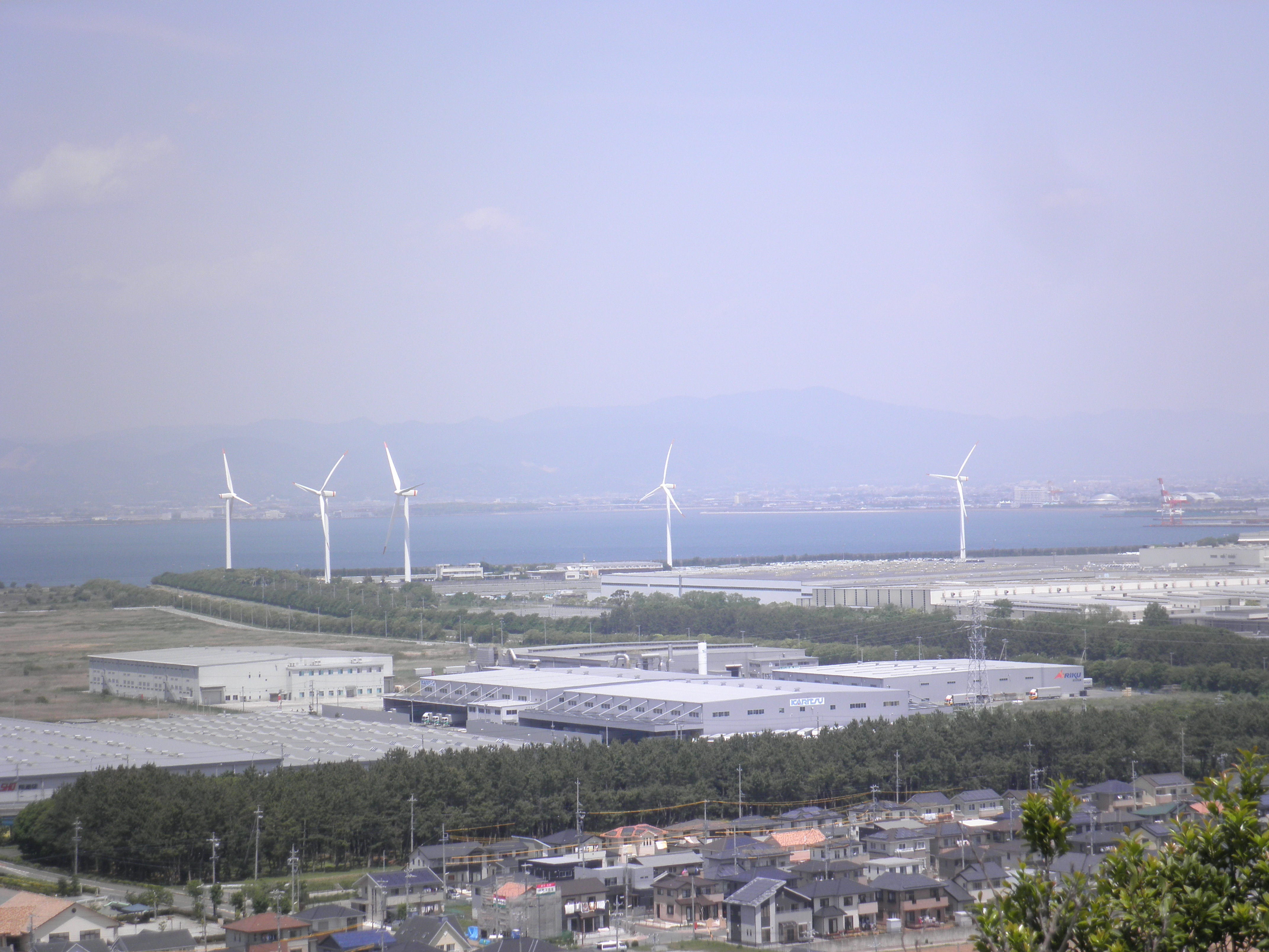 愛知県田原市の笠山から見た田原臨海風力発電所の風力発電機